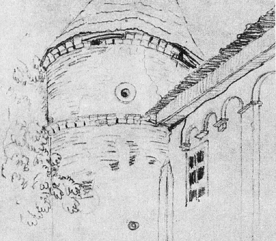 Беларуская (тарашкевіца): Вежа і сьцяна, да якой прыбудавана плябанія, старажытнага абарончага комплексу Койданаўскага пратэстанцкага збору.